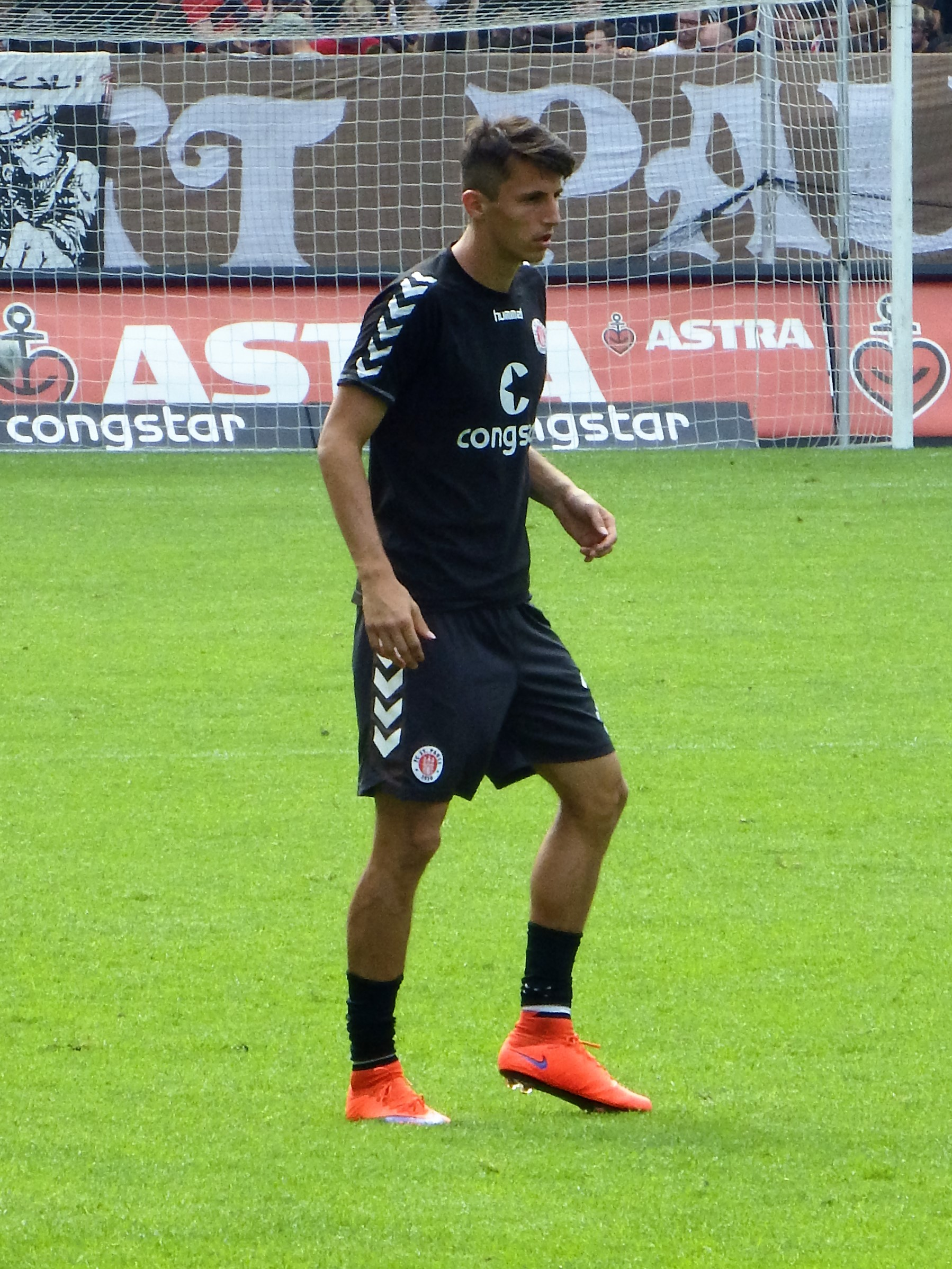 Ante Budimir FC St.Pauli